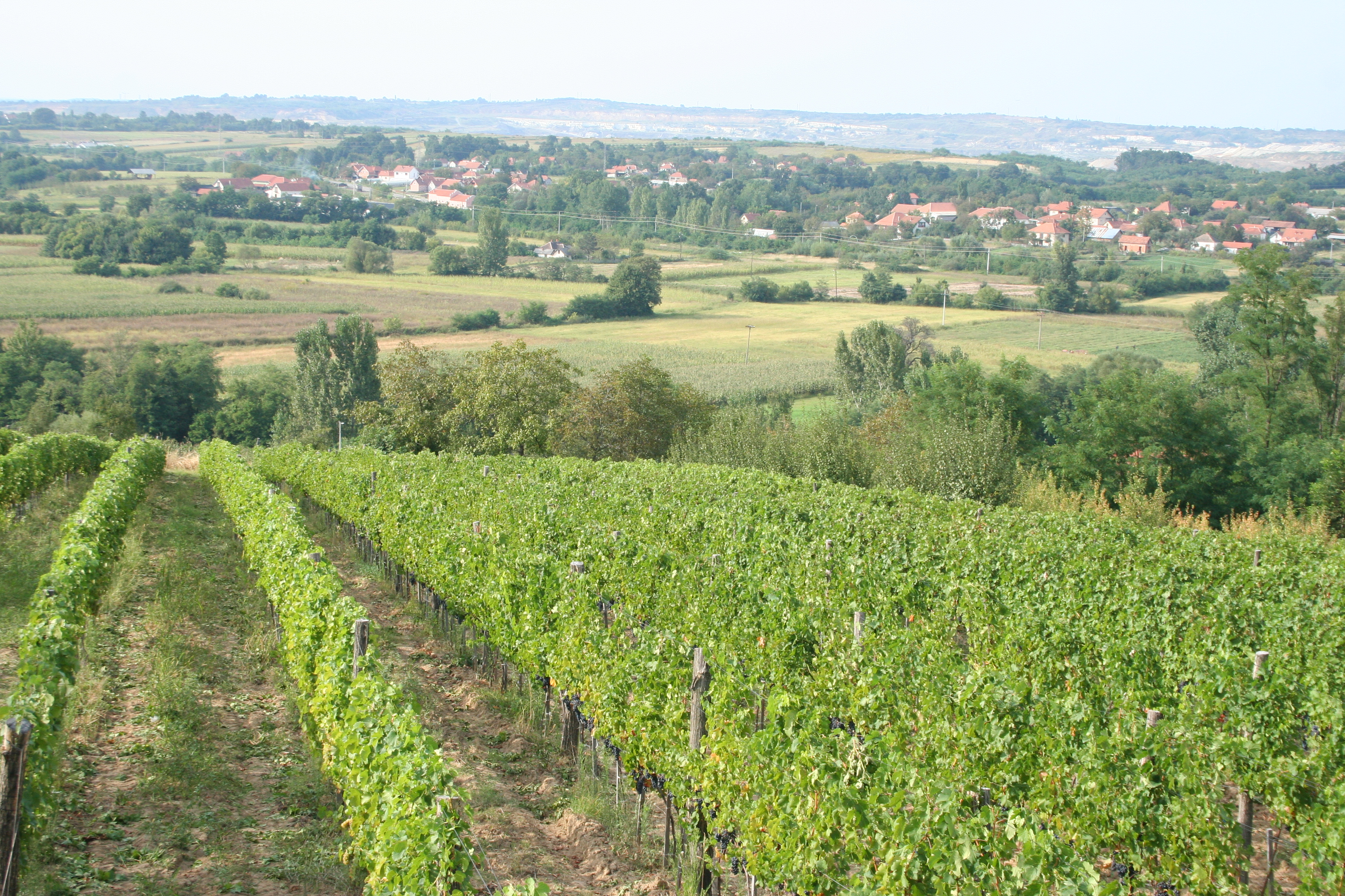 Fotografija je moja i prikazuje deo naseljenog mesta Zeoke.